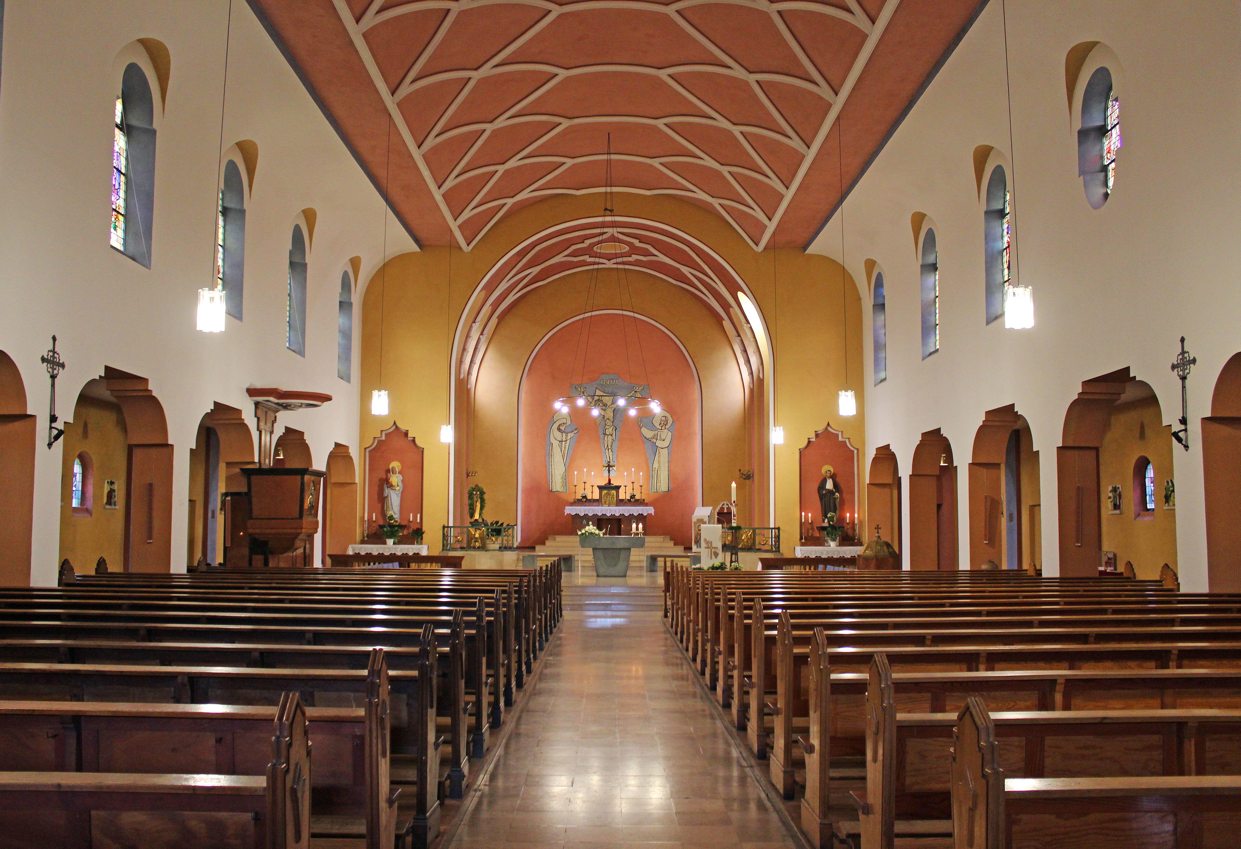 Blick ins Innere der katholischen Pfarrkirche St. Bonifatius in Überherrn, Landkreis Saarlouis, Saarland